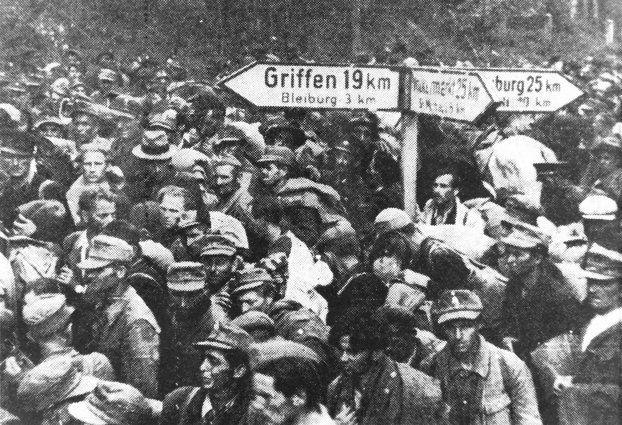 Kolona Ustašev in hrvaških beguncev blizu Pliberka.